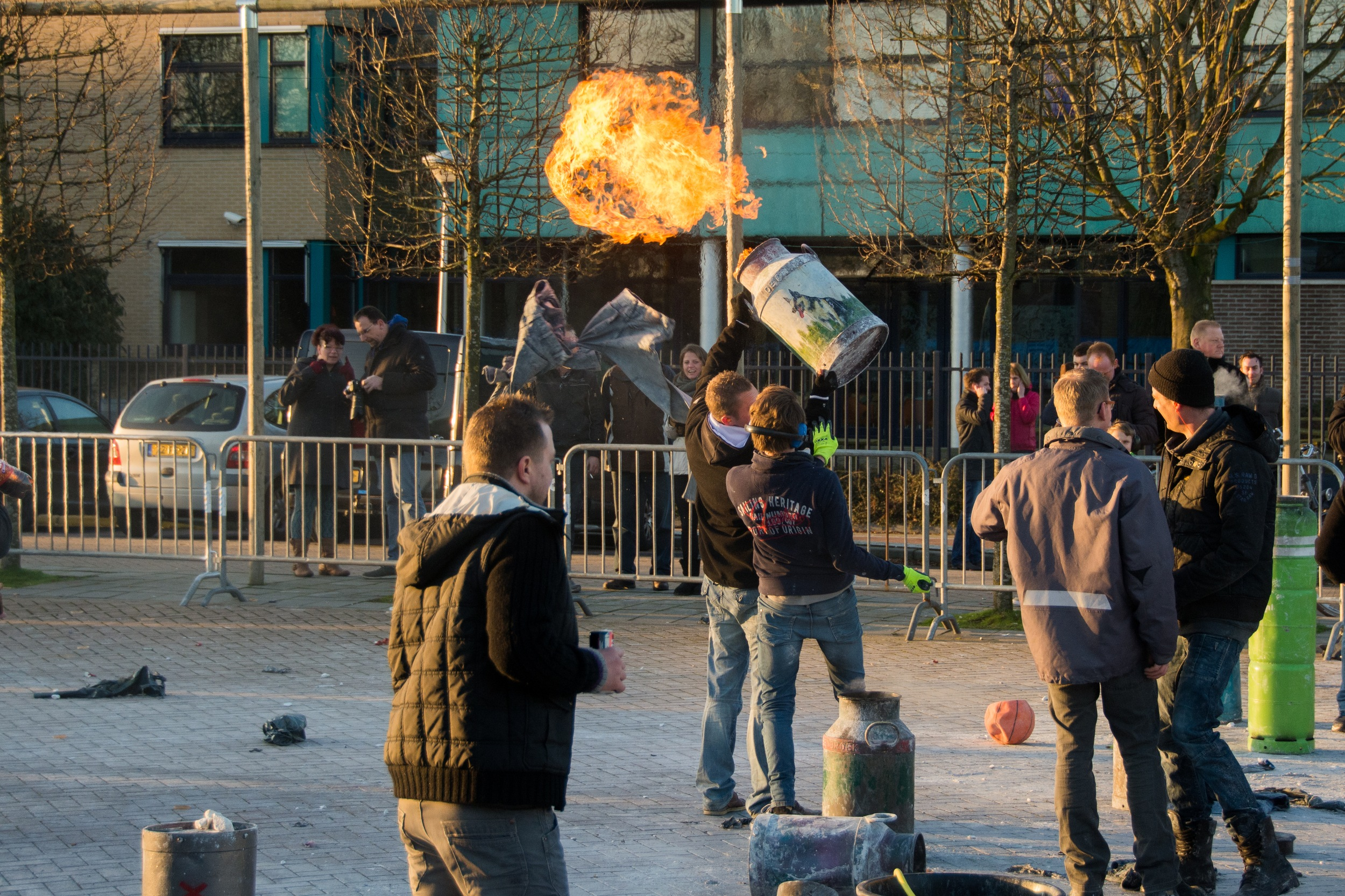 Carbid bussen schieten in Kampen.